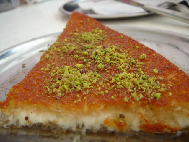 Hatay'da çekilmiş bir künefe fotoğrafı